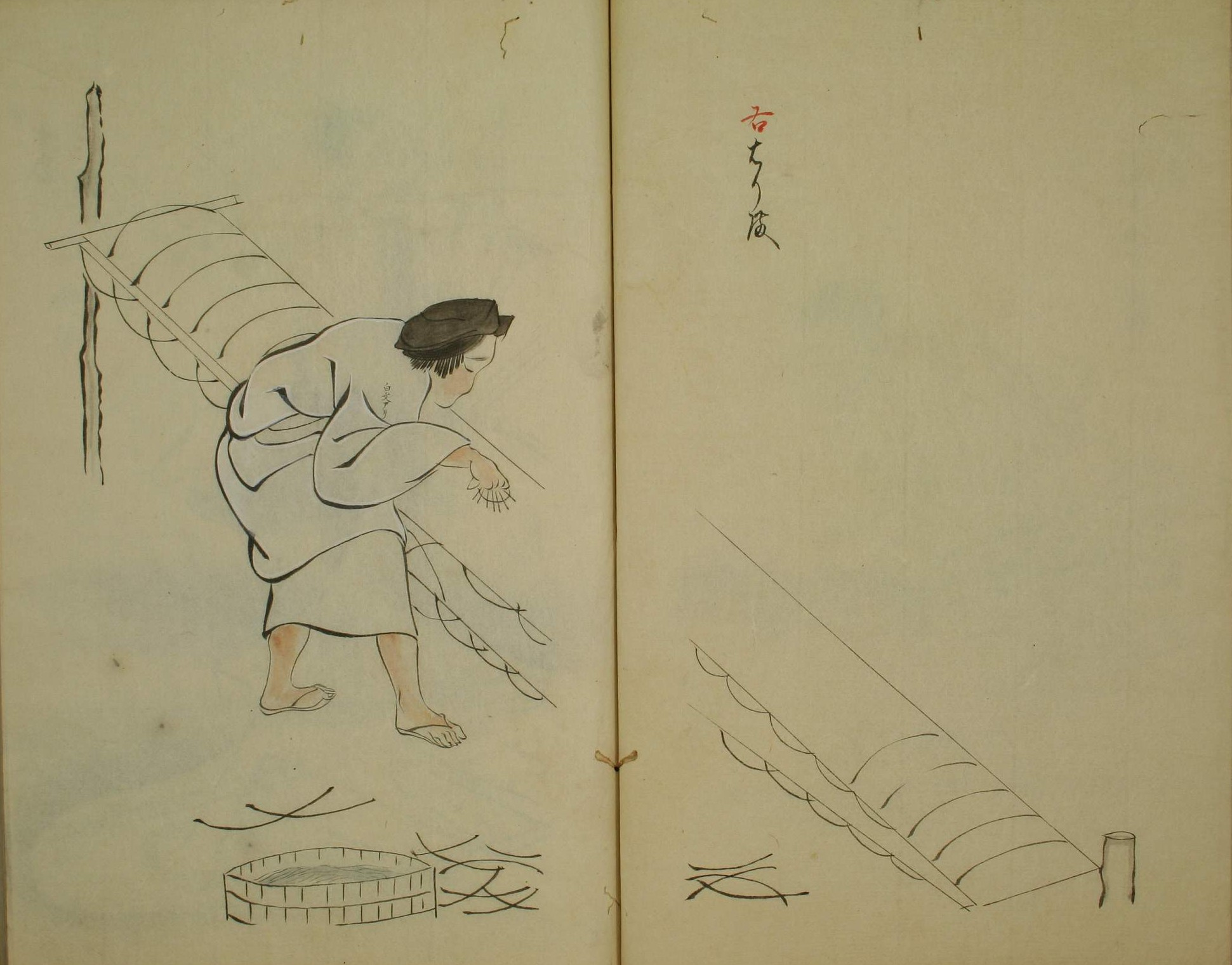 三十二番職人歌合』、垂恵 (?)、1494年、その1838年模写